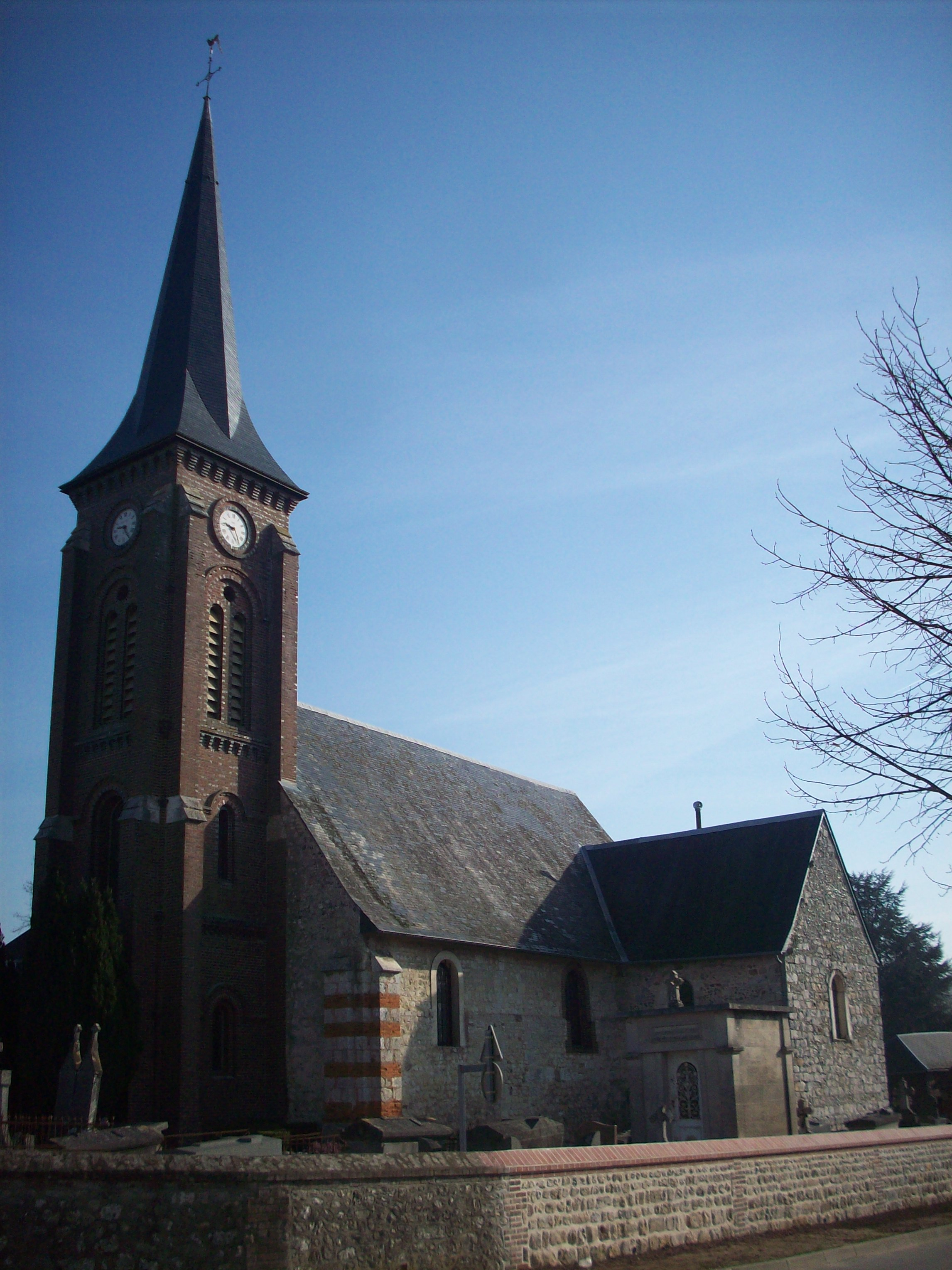 Eglise Saint-Martial de Vascoeuil, datant du XIe au XVIIe siècle.